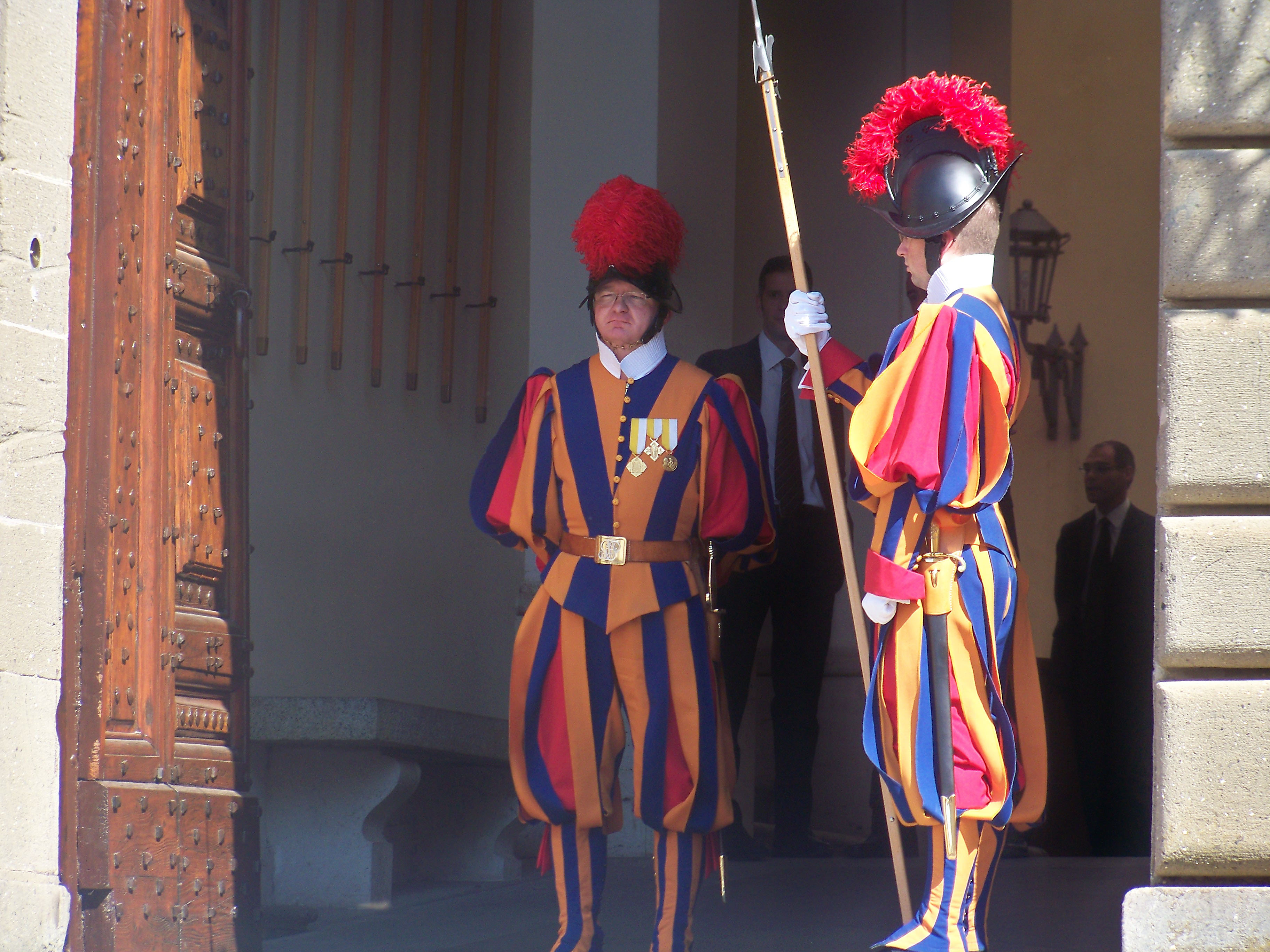 Castelgandolfo, August, 2011